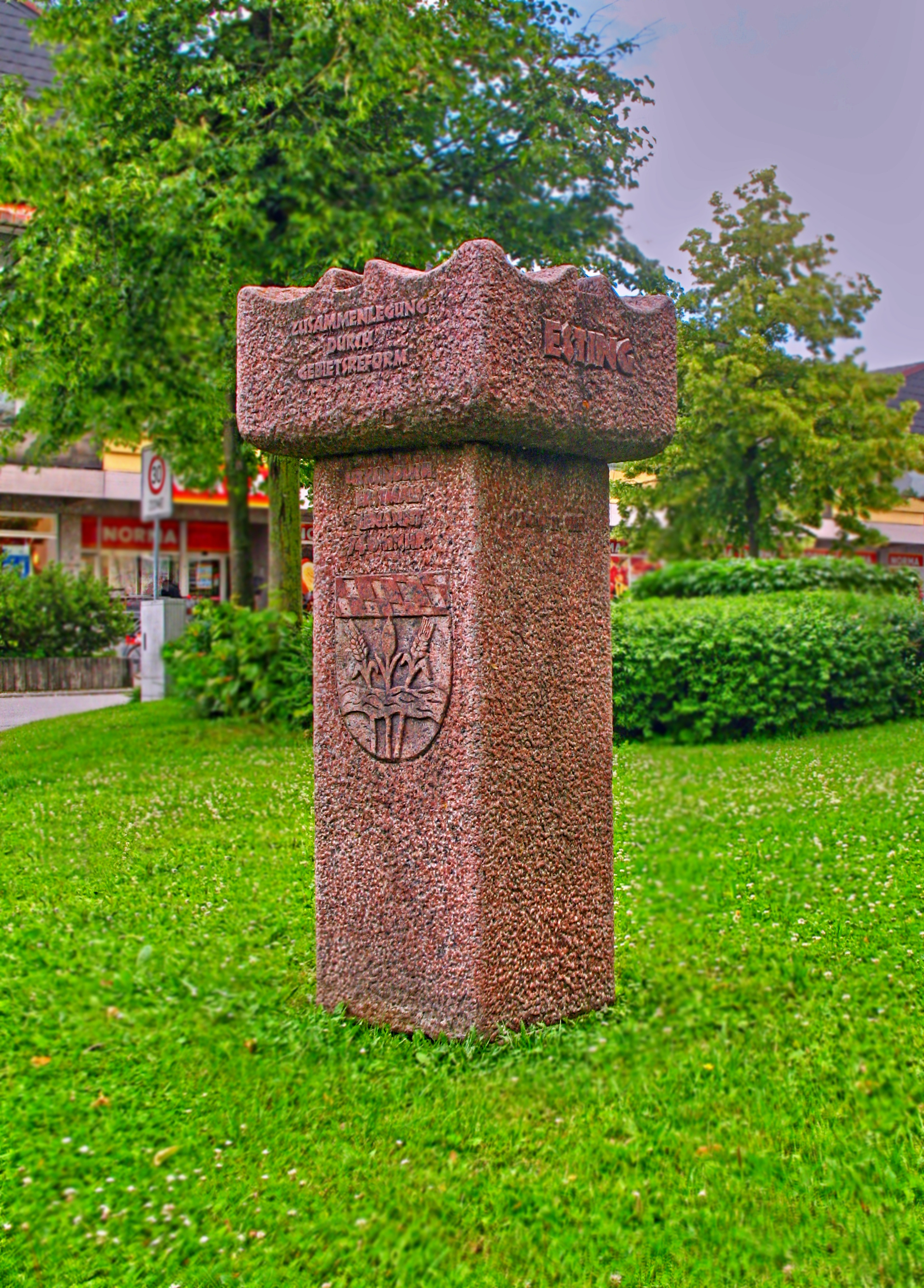 Deutschland, Bayern, Landkreis Fürstenfeldbruck, Olching, Gedenkstein zur Gebietsreform 1978 am Josef-Kistler-Platz